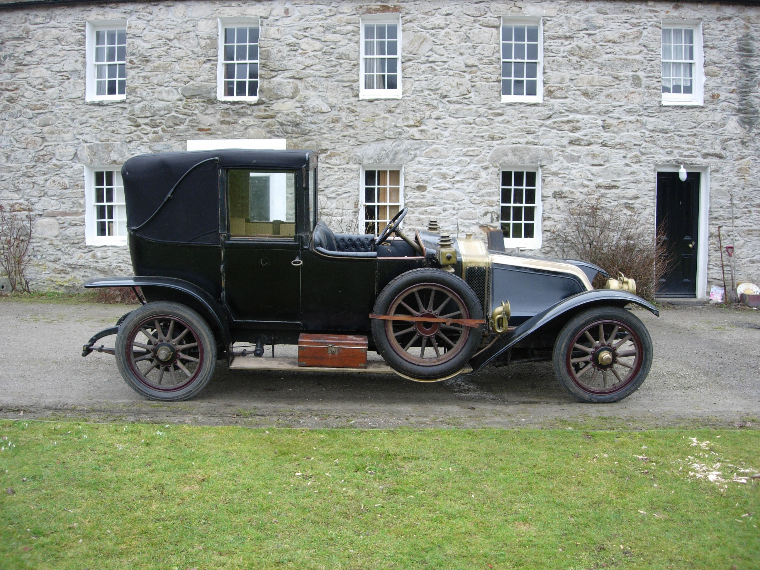 Renault ED 1914